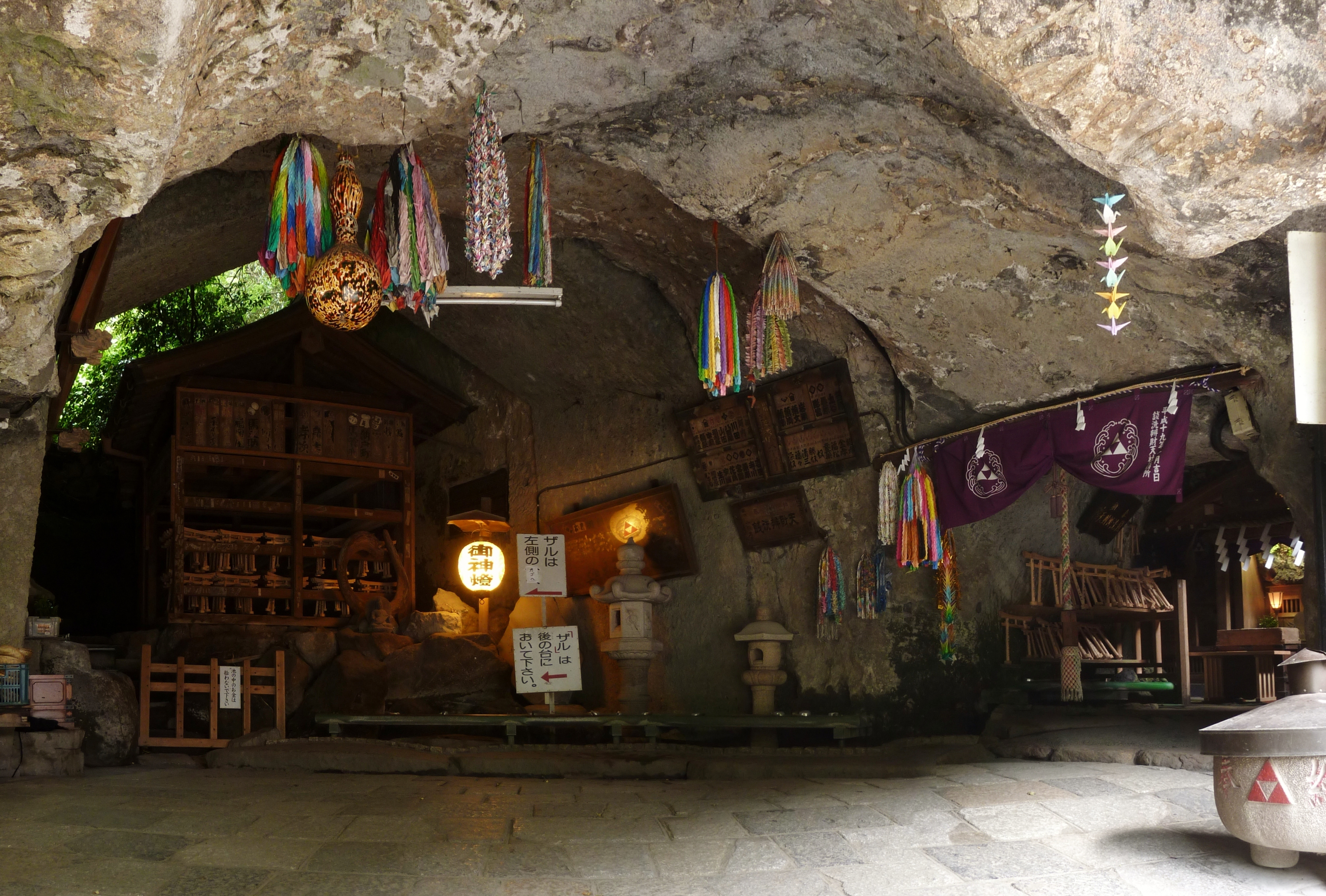 銭洗弁財天宇賀福神社（銭洗弁天）の奥宮（神奈川県鎌倉市）